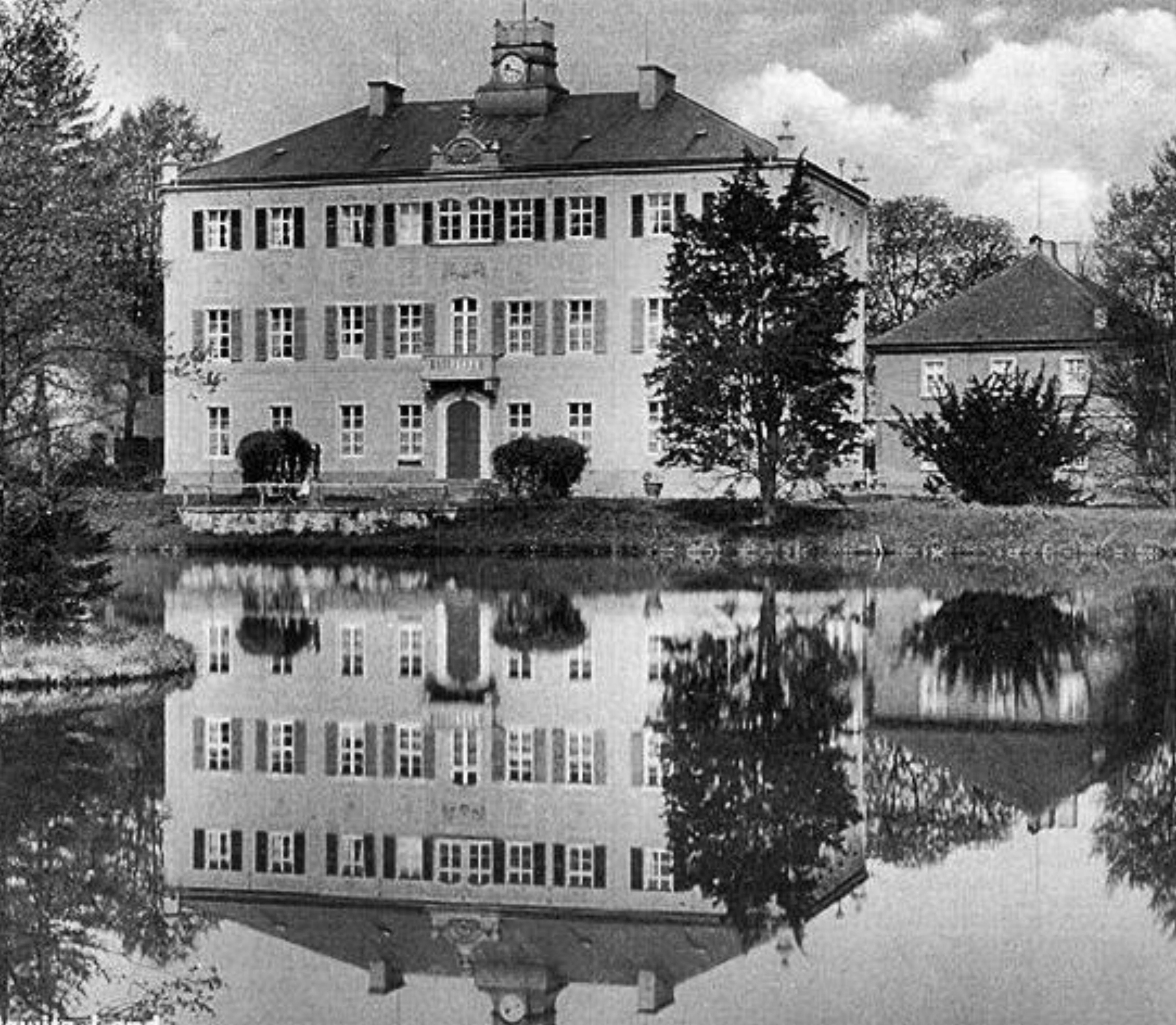 Schloss Lauterbach im Landkreis Meißen, Schlossansicht um 1933, ohne Dachreiter